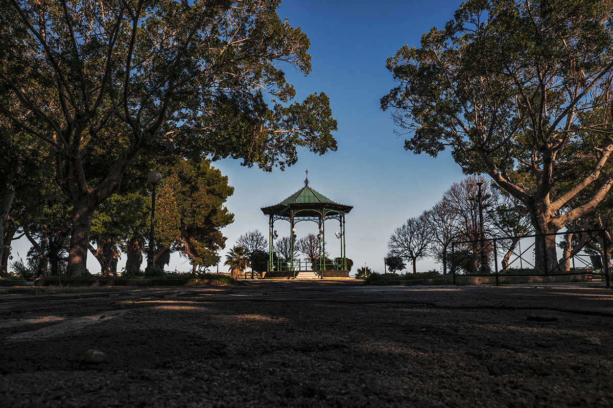 Il palco della musica ai giardini pubblici